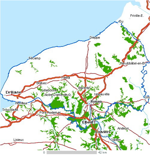 Carte du département Saine-Maritime Légende